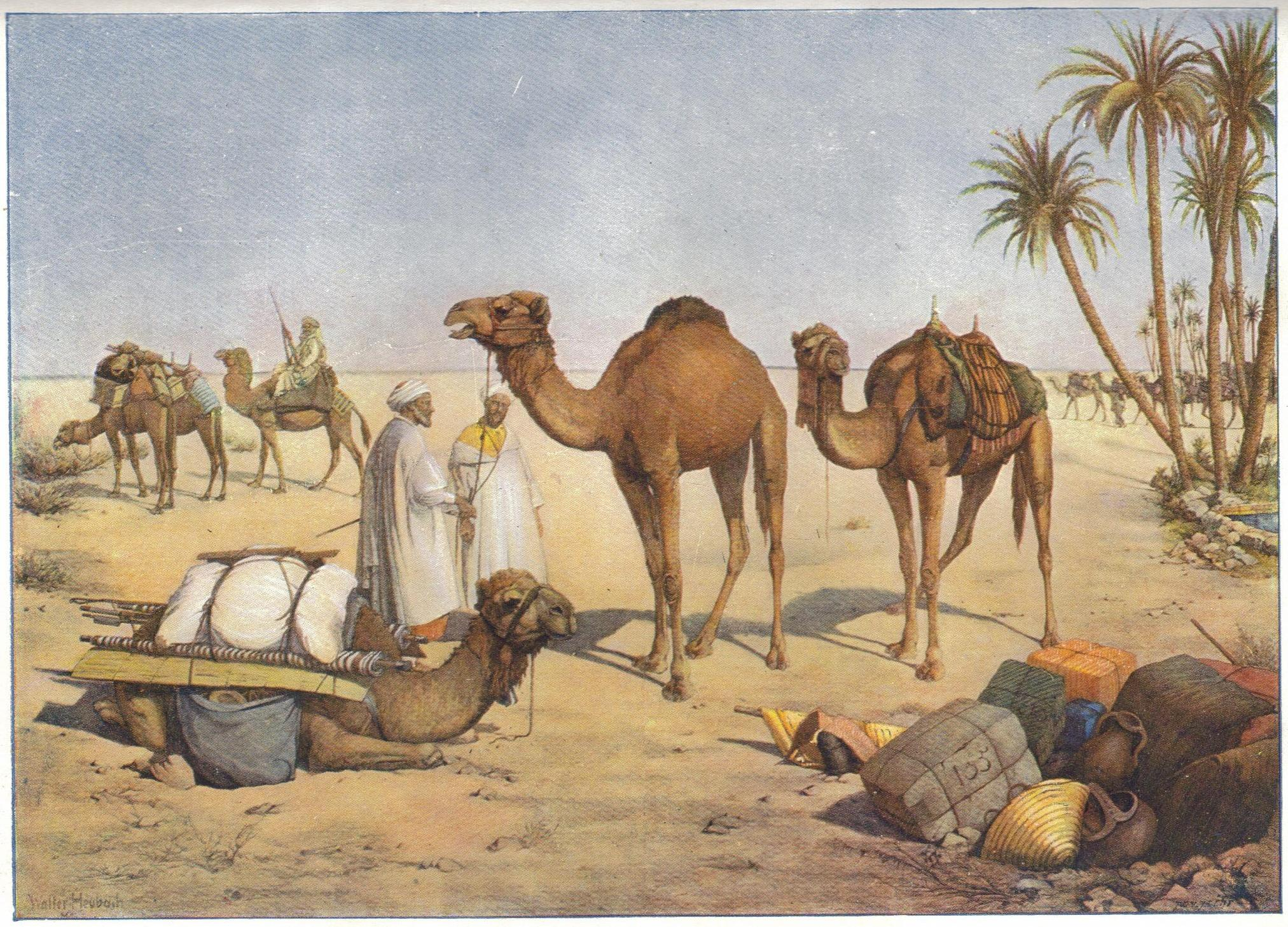 Gemälde einer lagernden Karawane mit Dromedaren von Walter Heubach (1865–1923). Die Bedeutung als Last- und Reittiere reicht bis in die heutige Zeit, wenngleich Kamele vielerorts dem technischen Fortschritt gewichen sind.